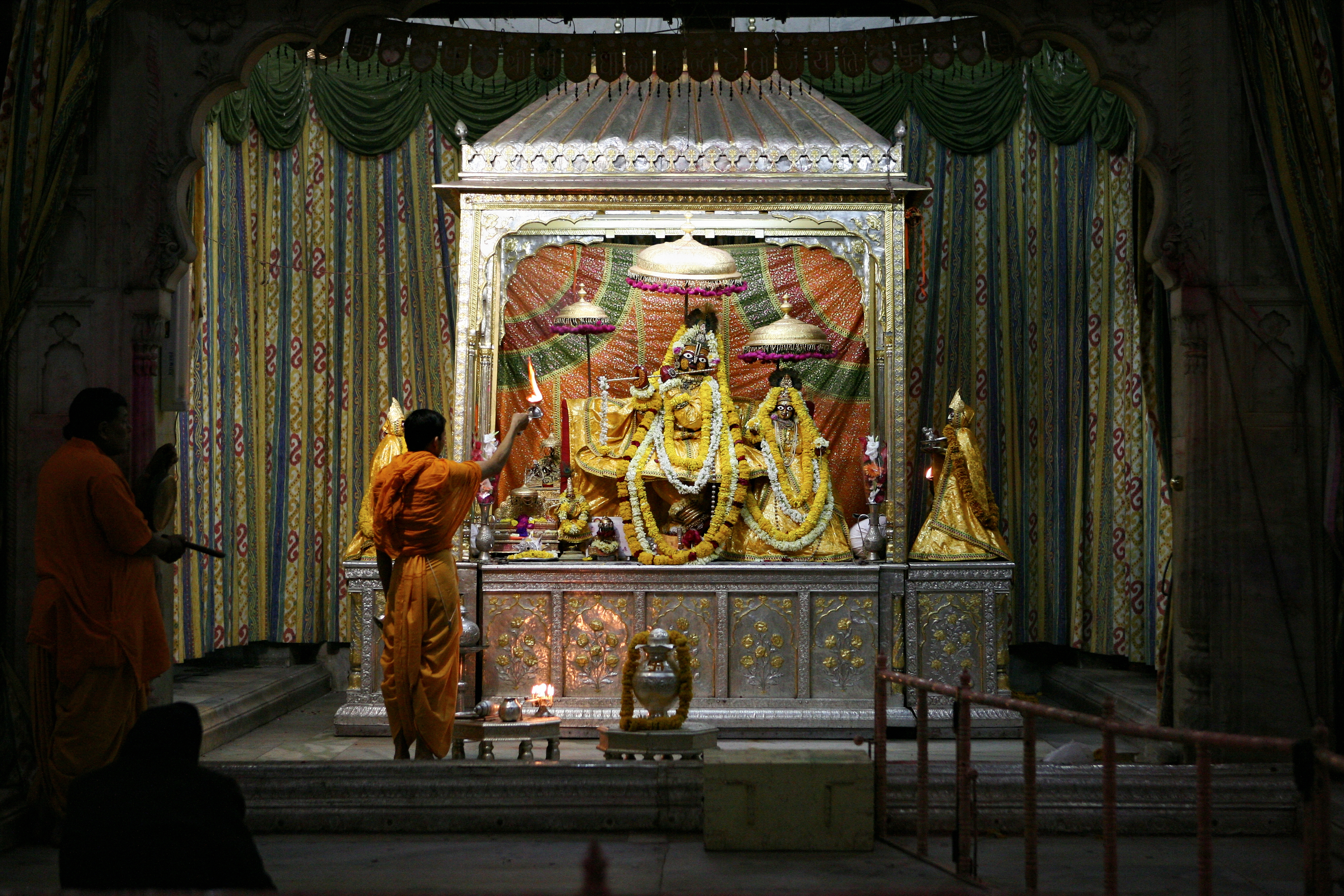 В храме Говиндаджи в Джайпуре